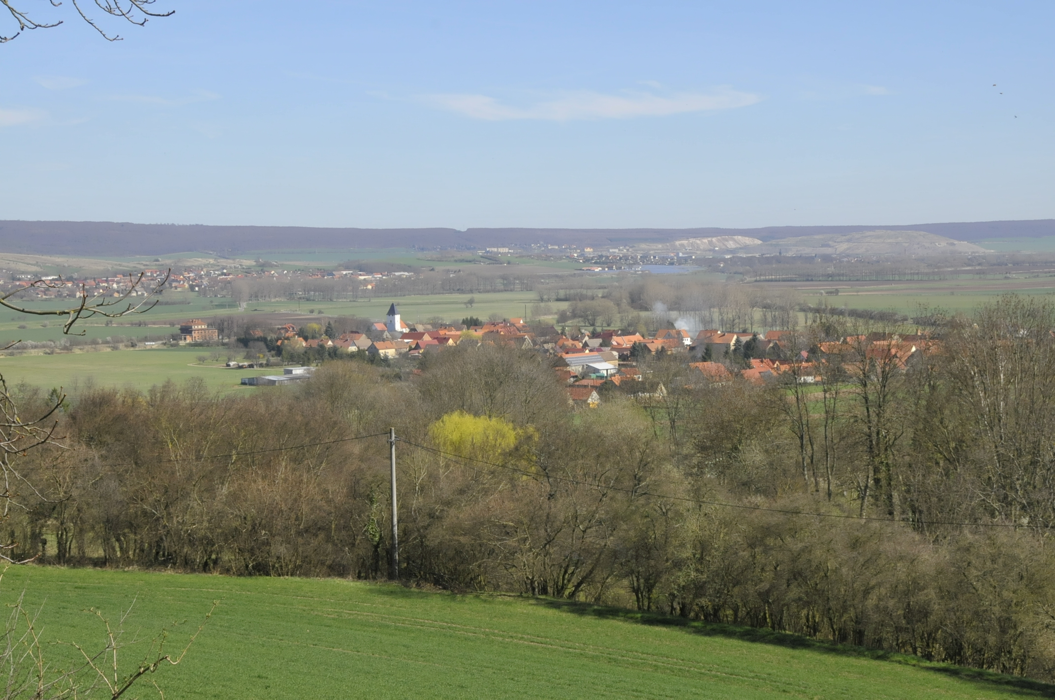 Ortsansicht von Donndorf vom Kloster Donndorf aus gesehen